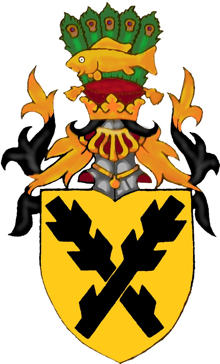 Foto erbu panu z Lipe z vystavy